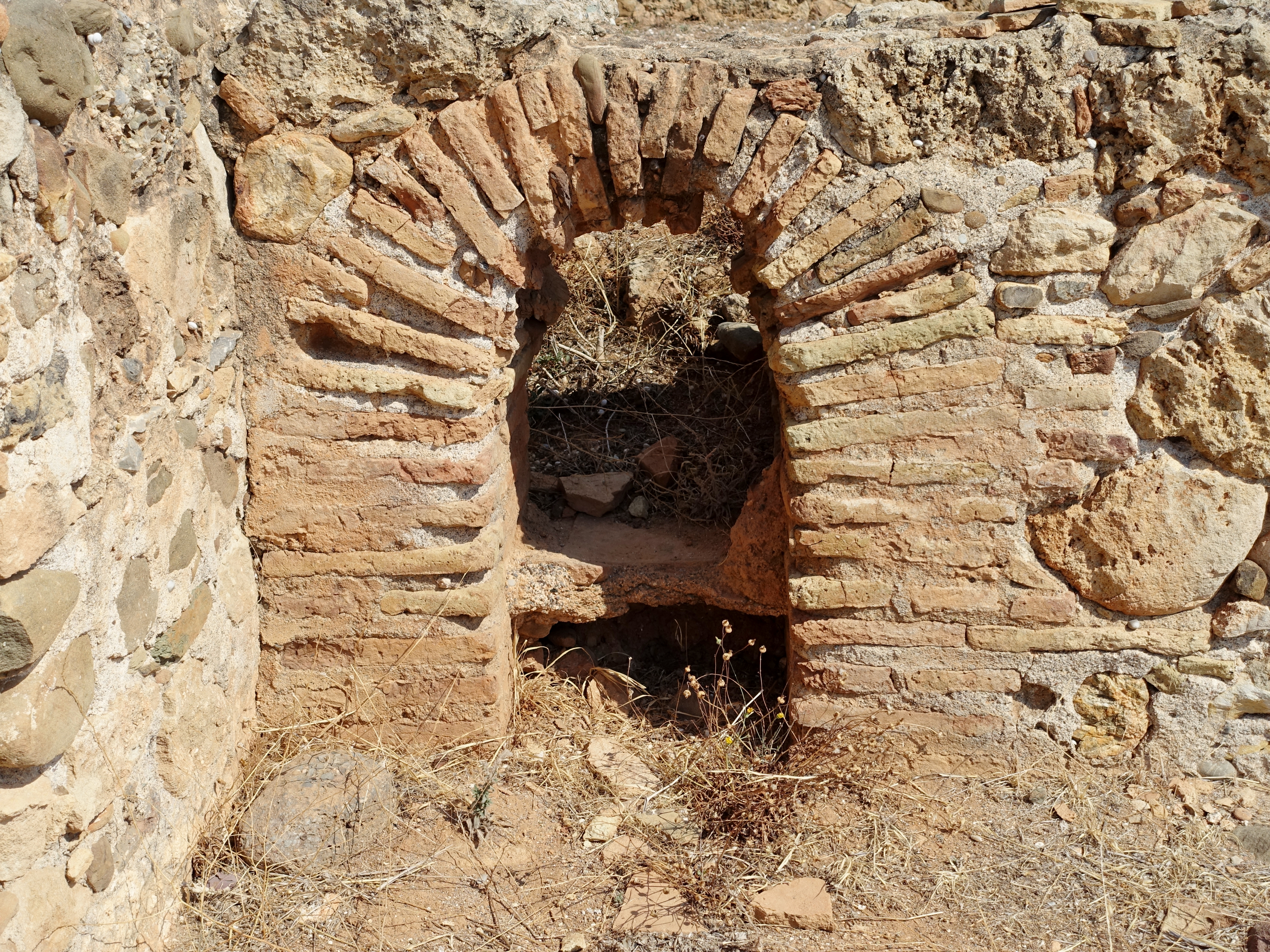 Ausgrabungsstätte der römischen Villa von Makrygialos, Kreta, Griechenland